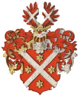 Rüdigeri suguvõsa aadlivapp